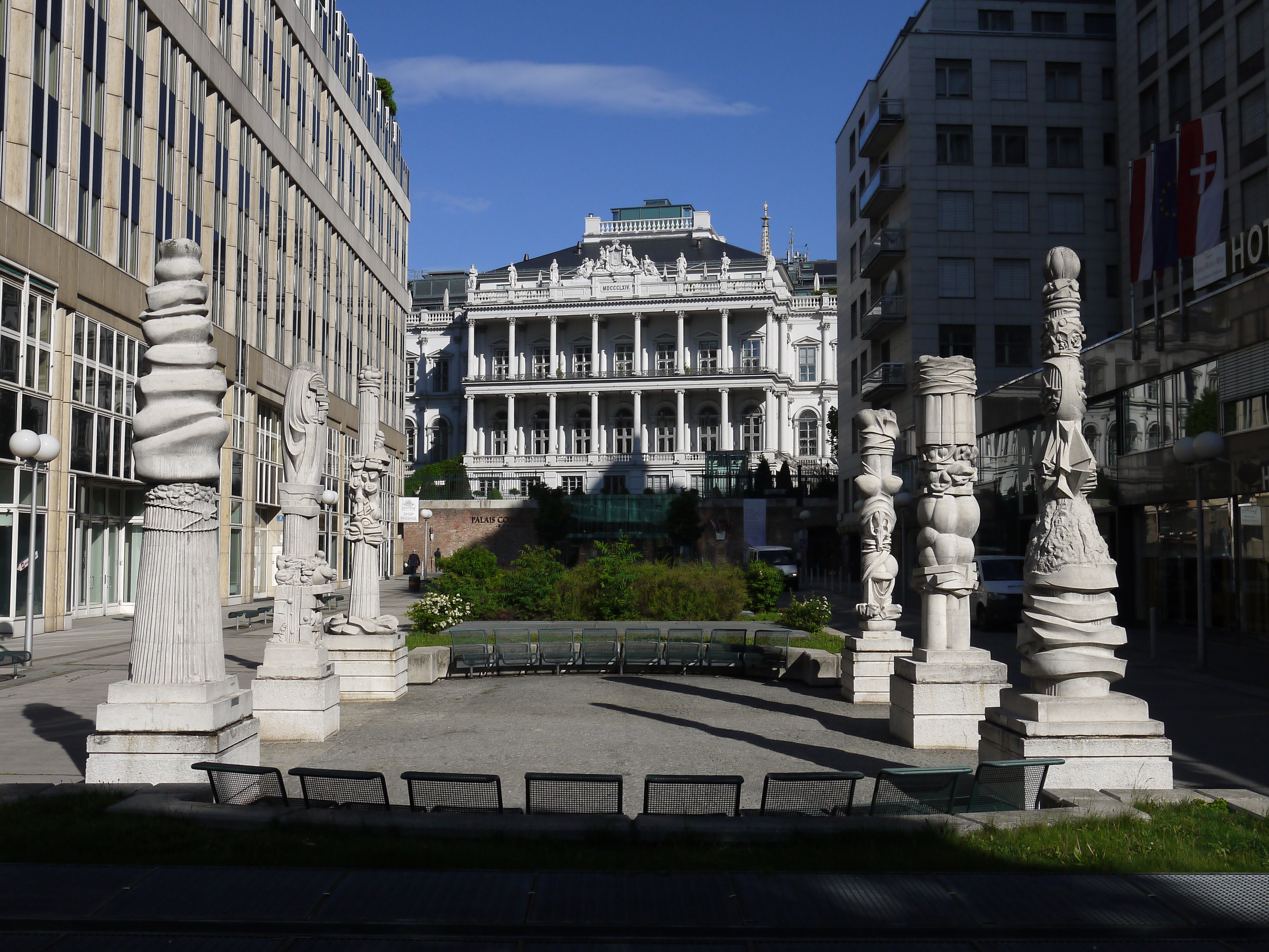 Bertoni Sklulpturen Theodor Herzl Platz